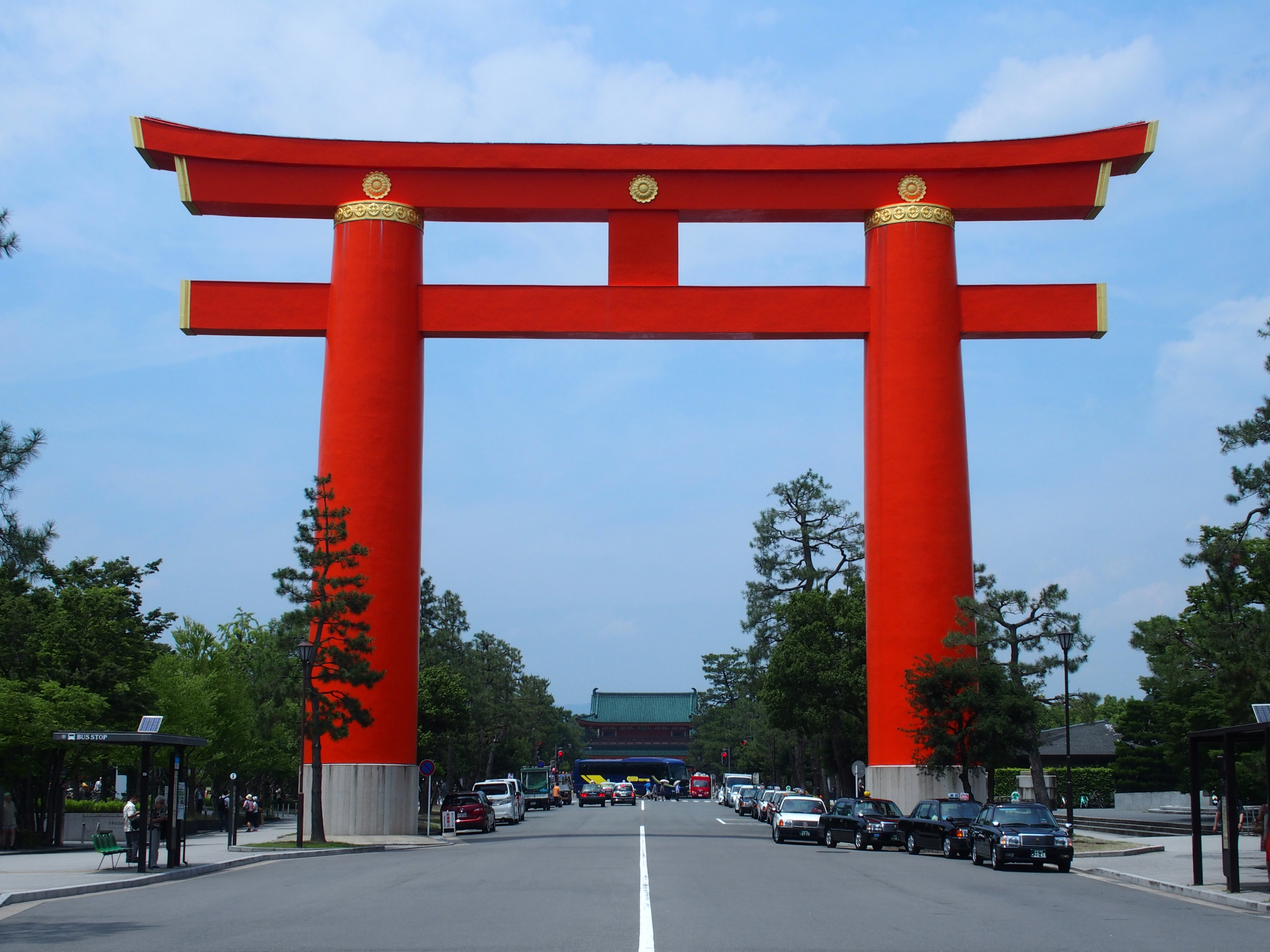 京都の平安神宮大鳥居